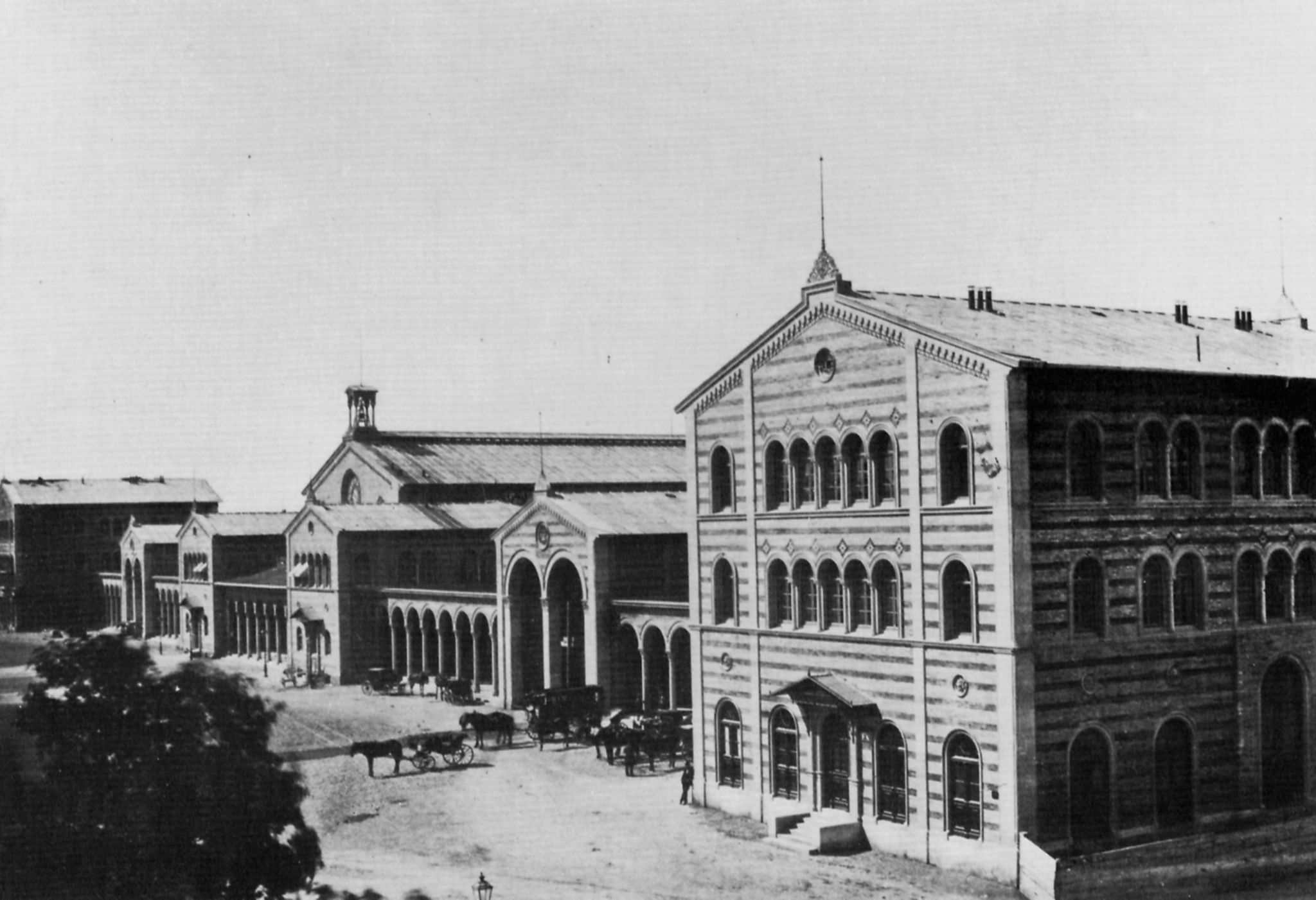 Originale Bildunterschrift: Blick auf die Hauptfront des Münchner Bahnhofes in südwestlicher Richtung